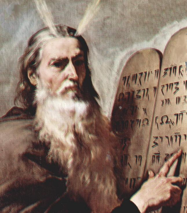 detail: Moses mit den Gesetzestafeln